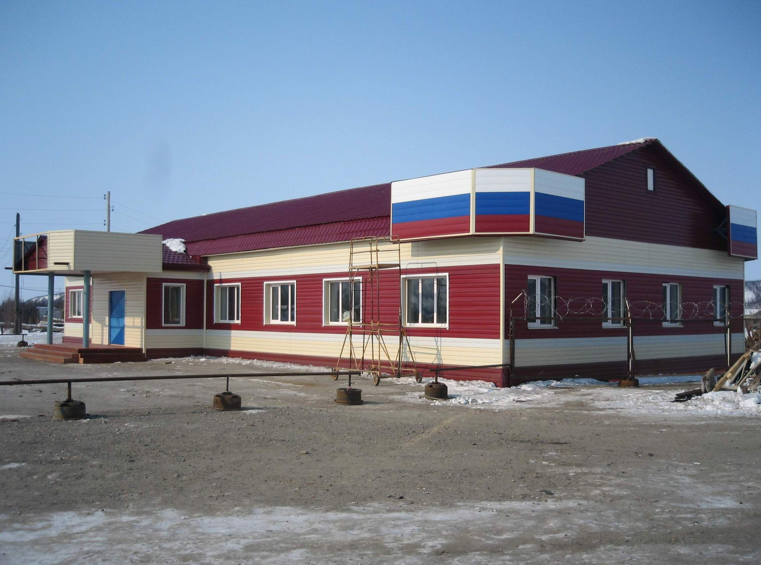 Обновленное здание аэропорта Кепервеем 2008 год